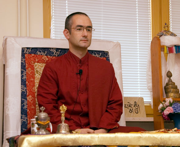 Seminar in Ljubljana Dharmaling Buddhist Center, 2007